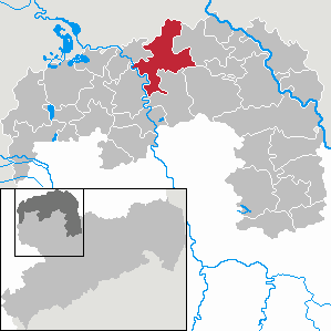 Laußig in Saxony - Landkreis Nordsachsen